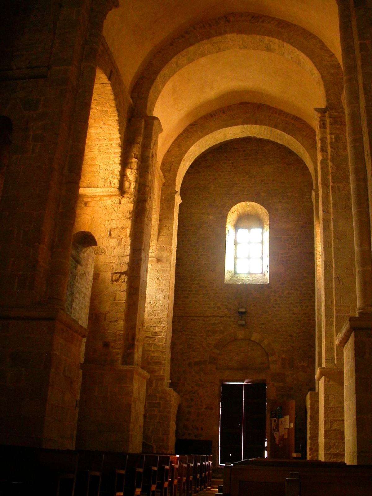 Nave central de Sant Andreu de Sureda